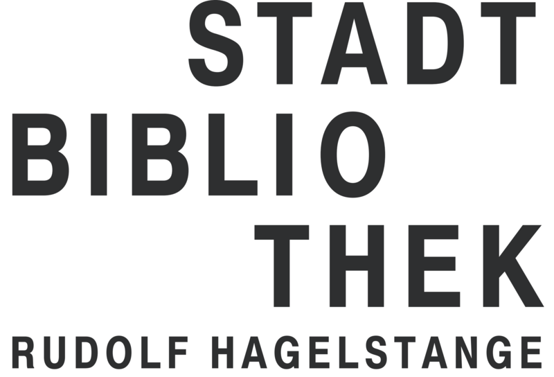 Logo der Stadtbibliothek Nordhausen